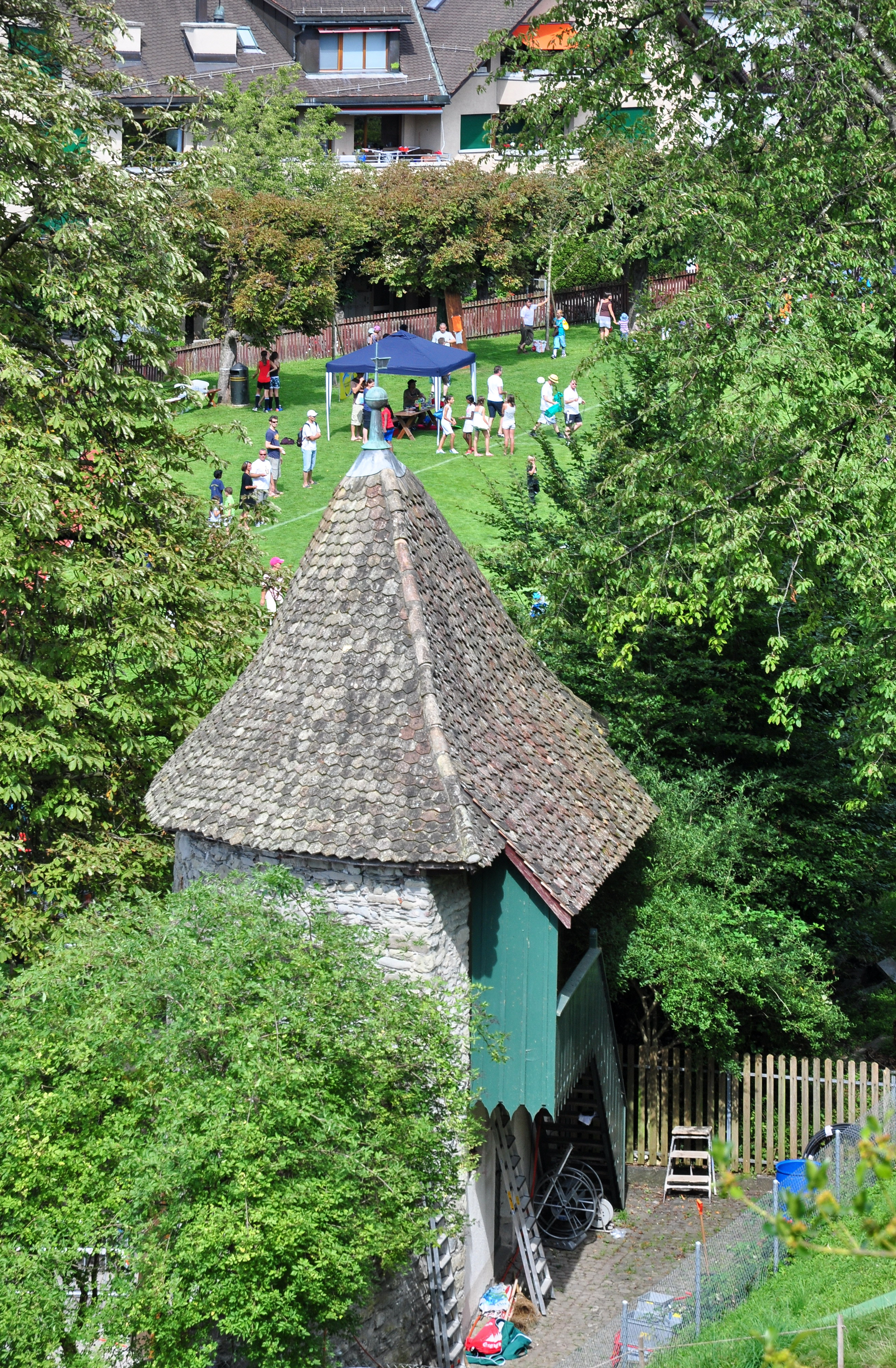 Haldenturm in Rapperswil (Switzerland) as seen from Herrenberg